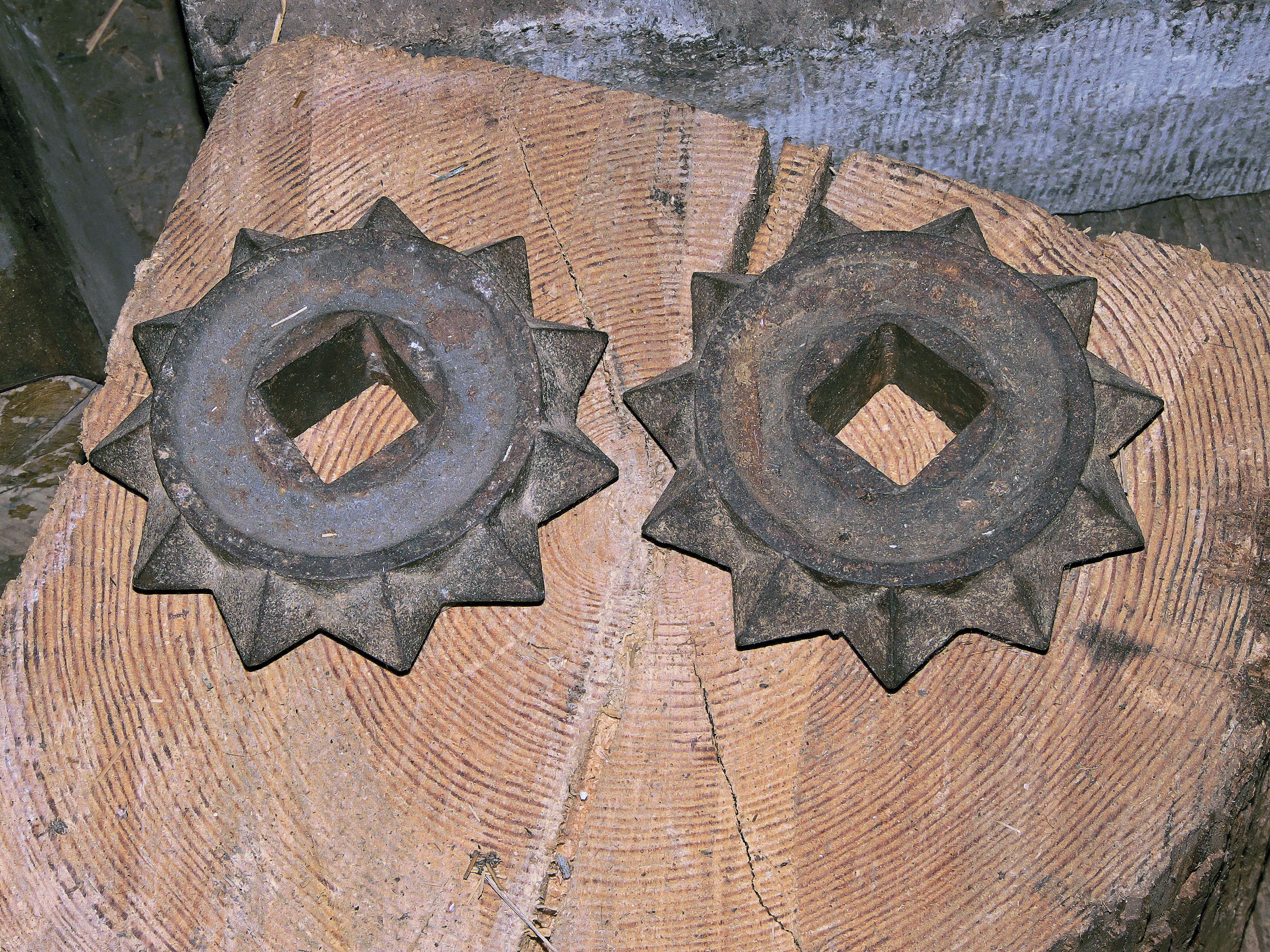 Molen De Passiebloem koekenbrekertanden